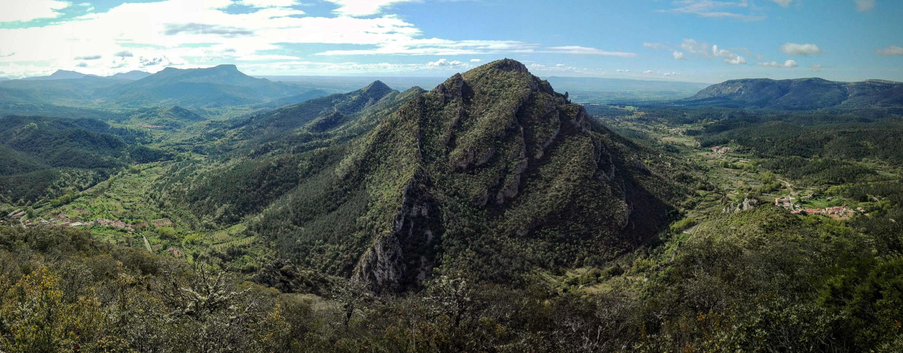 Vista parcial del valle de las Caderechas desde la cima de El Mazo (1035m), en Quintanaopio (Burgos, CyL - España).